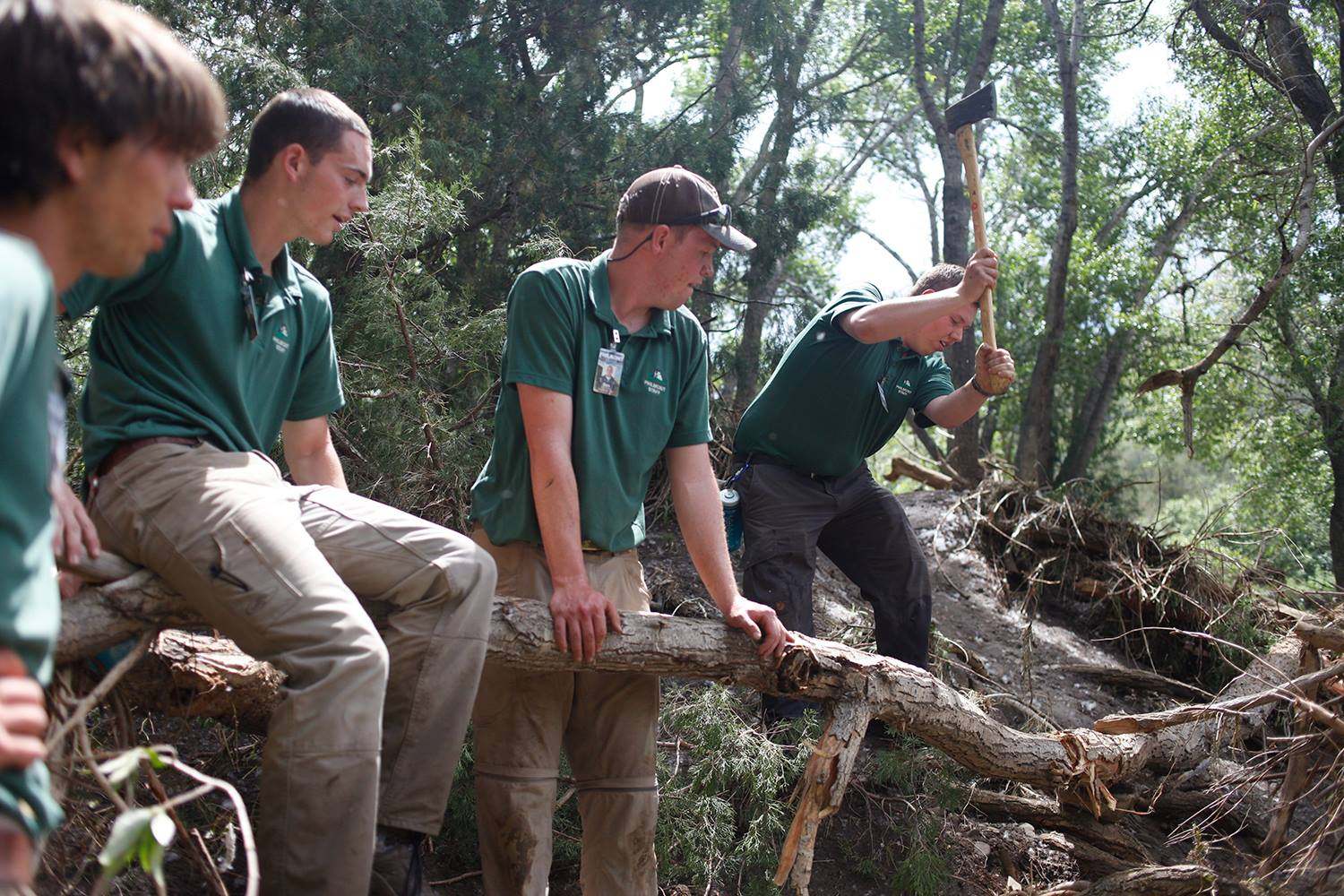 Nicolai Emil Johansen and other staff cleans up after the 2015 philmont flood